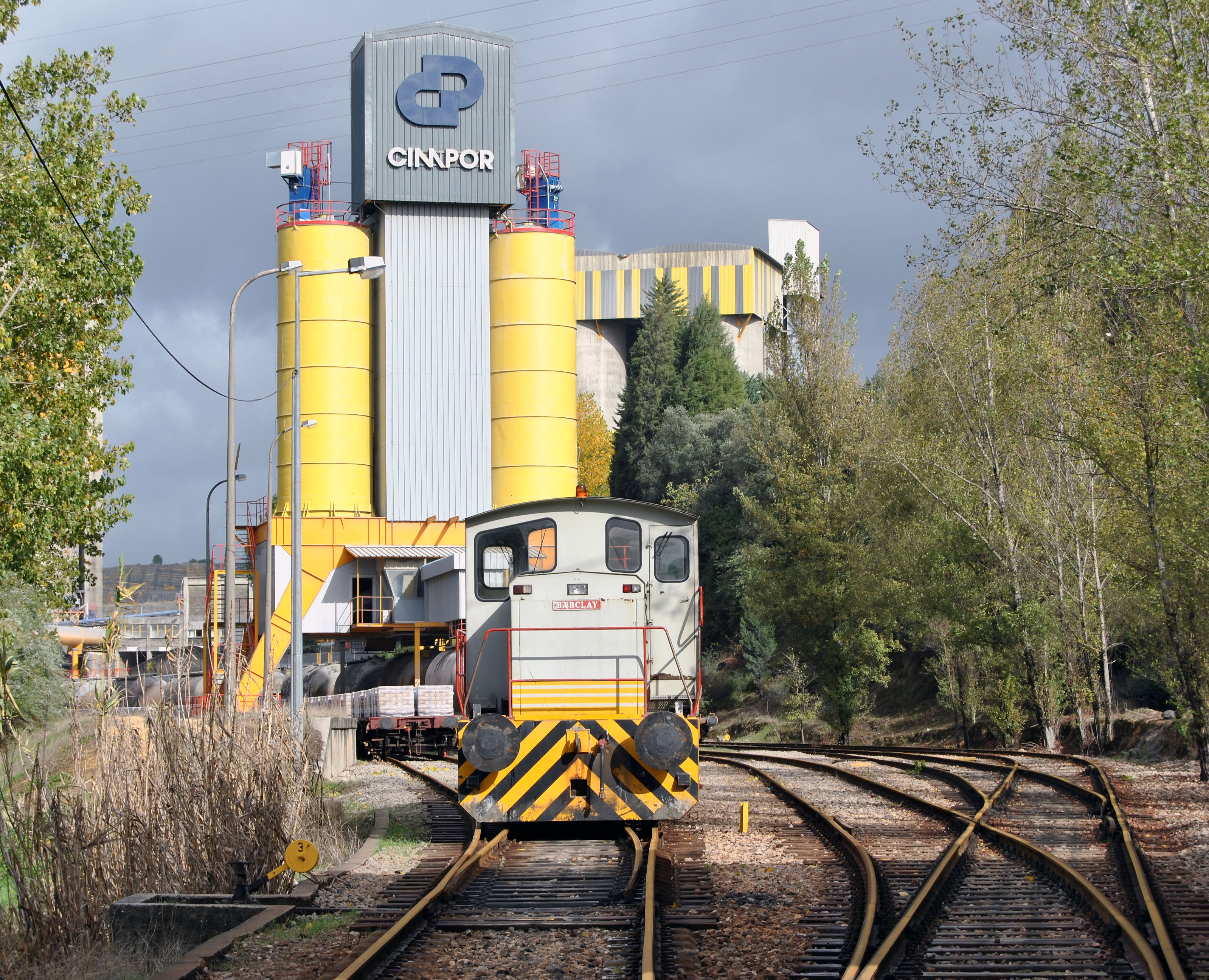 Barclay na Cimpor de Souselas